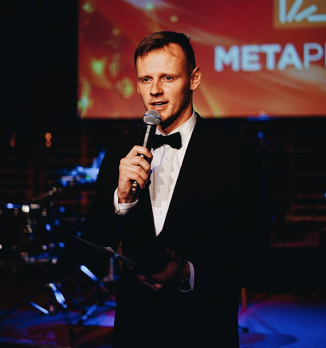 Norbert Kaareste